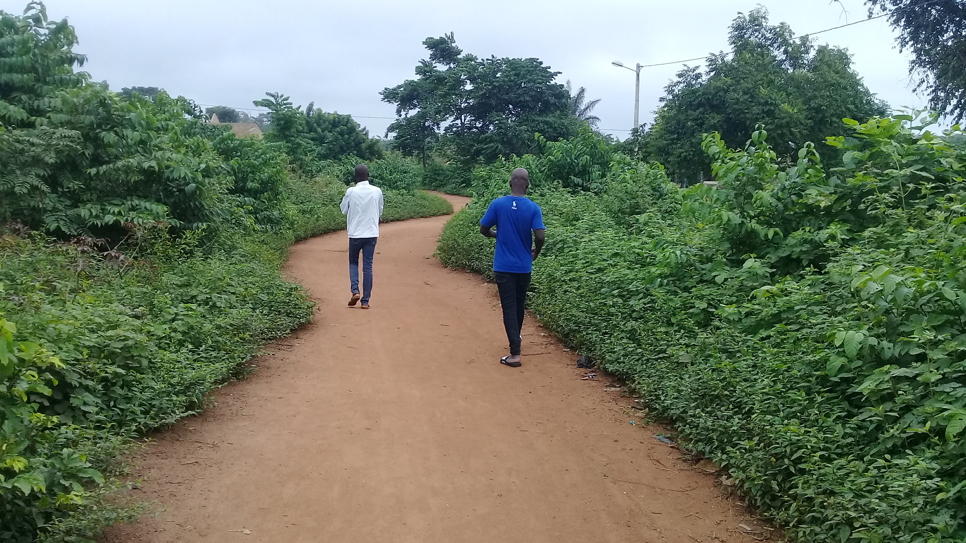 Torossanguéhi est une localité du nord-est de la Côte d'Ivoire